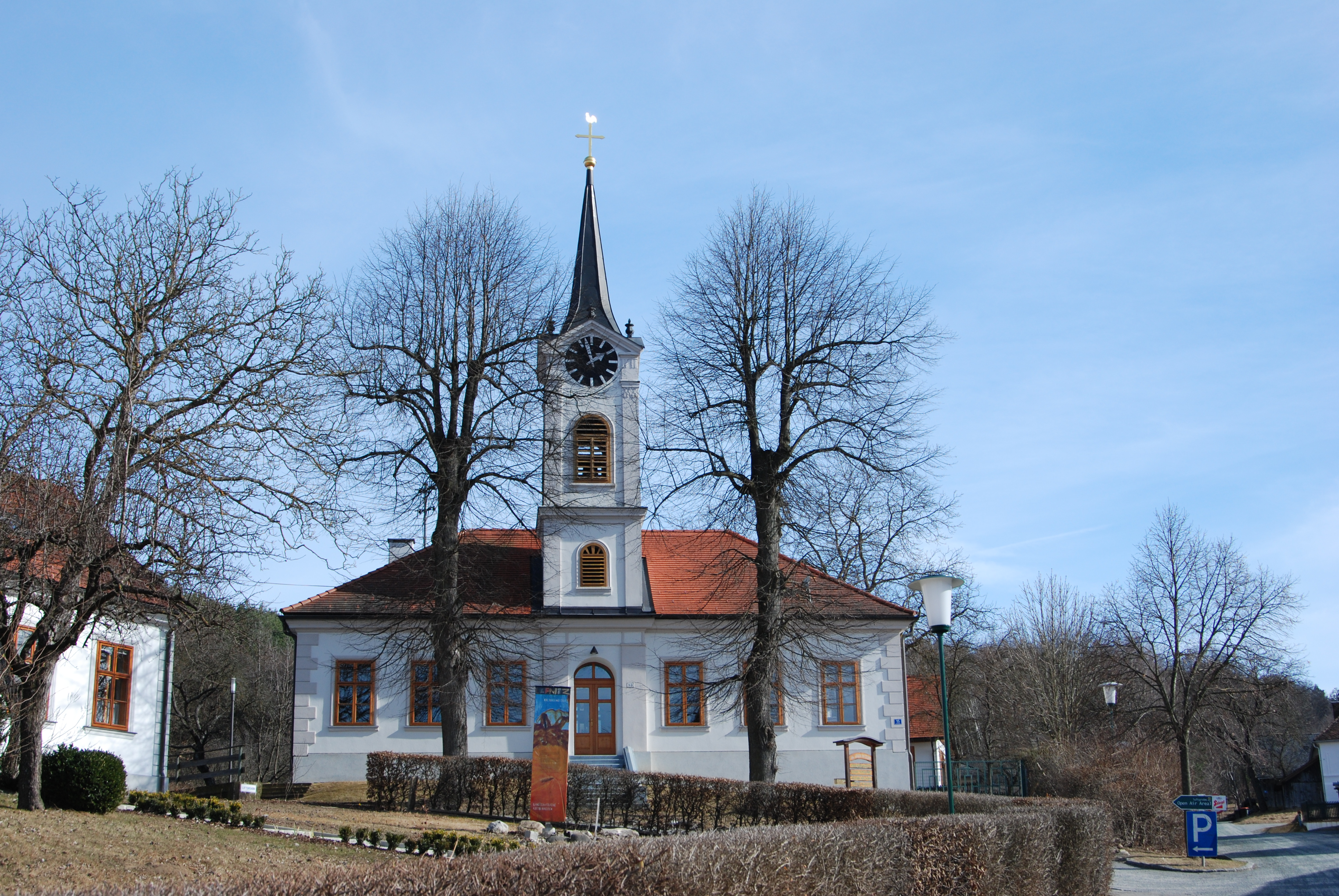 Evangelisches Schul- und Bethaus Buchschachen